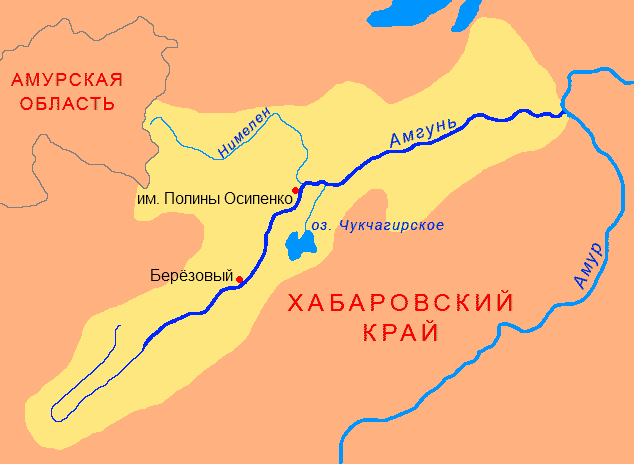 Схема бассейна реки Амгунь